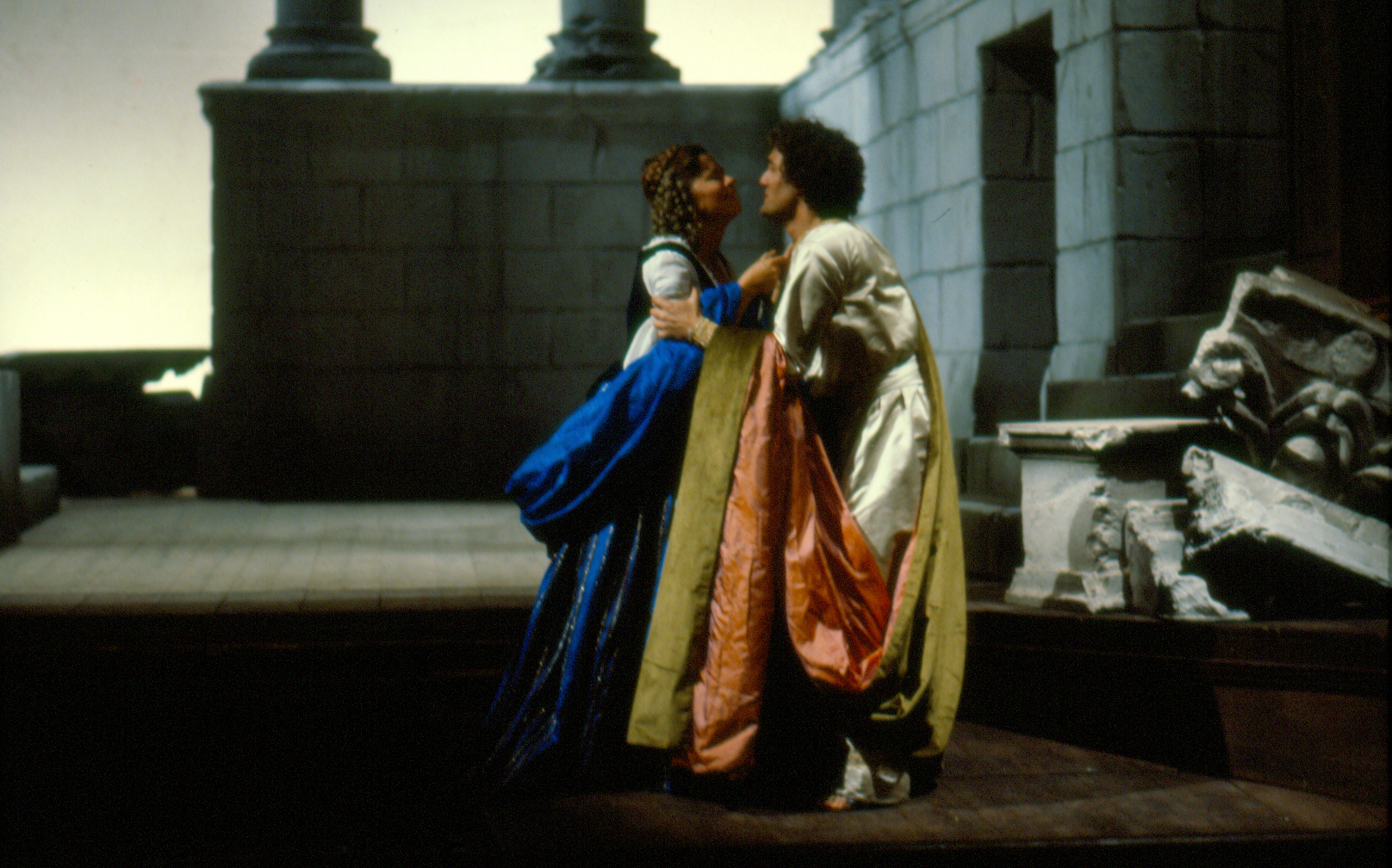 L'incoronazione di Poppea